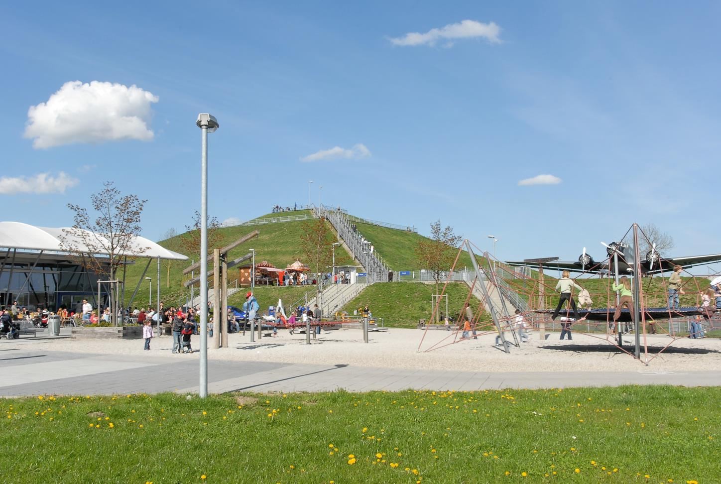 munich Airport, Besucherzentrum